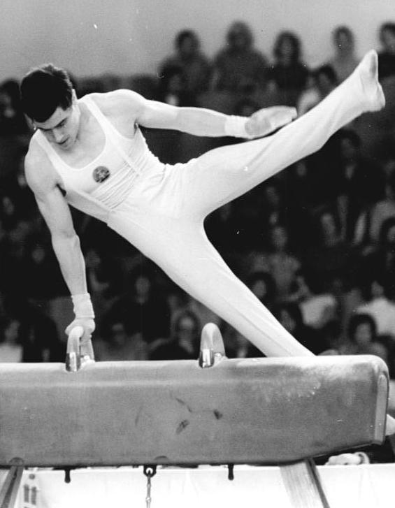 Wolfgang Thüne ADN-ZB Spremberg 27.4.1974 Wolfgang Thüne - erfolgreicher DDR-Turner im Länderkampf gegen Japan - In der Einzelwertung nach dem Pflichtprogramm das gegenwärtig in Yonago stattfindenden Turnländerkampfes zwischen Japan und der DDR erwies sich Wolfgang Thüne (Foto von einem früheren Wettkampf) mit 56,80 Punkten vor Shigeru Kasamatsu (56,75) und Doppelolympiasieger Sawao Kato (56,65) als Pflichtbester.